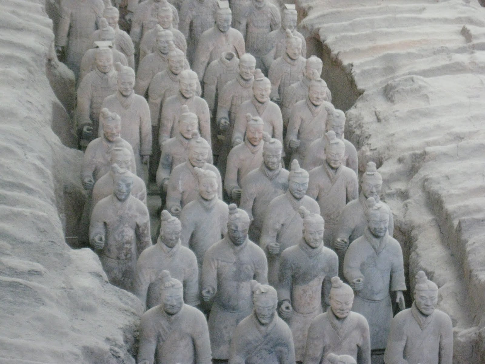 צבא הטרקוטה